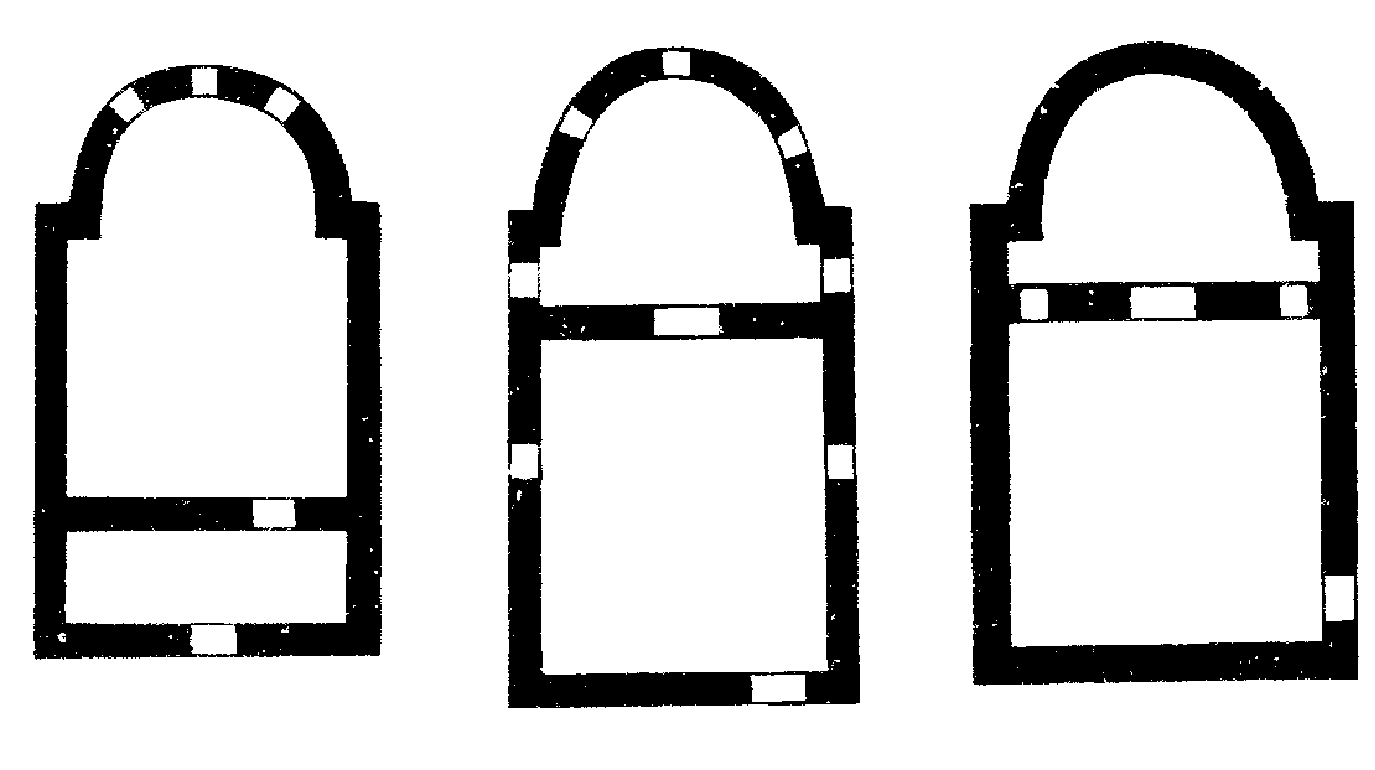 Фундаменты одноапсидных церквей Нижнего Архыза.